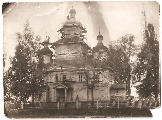 Беларуская (тарашкевіца): Ленін (Lenin), Сітніца (Sitnica). Царква Раства Багародзіцы